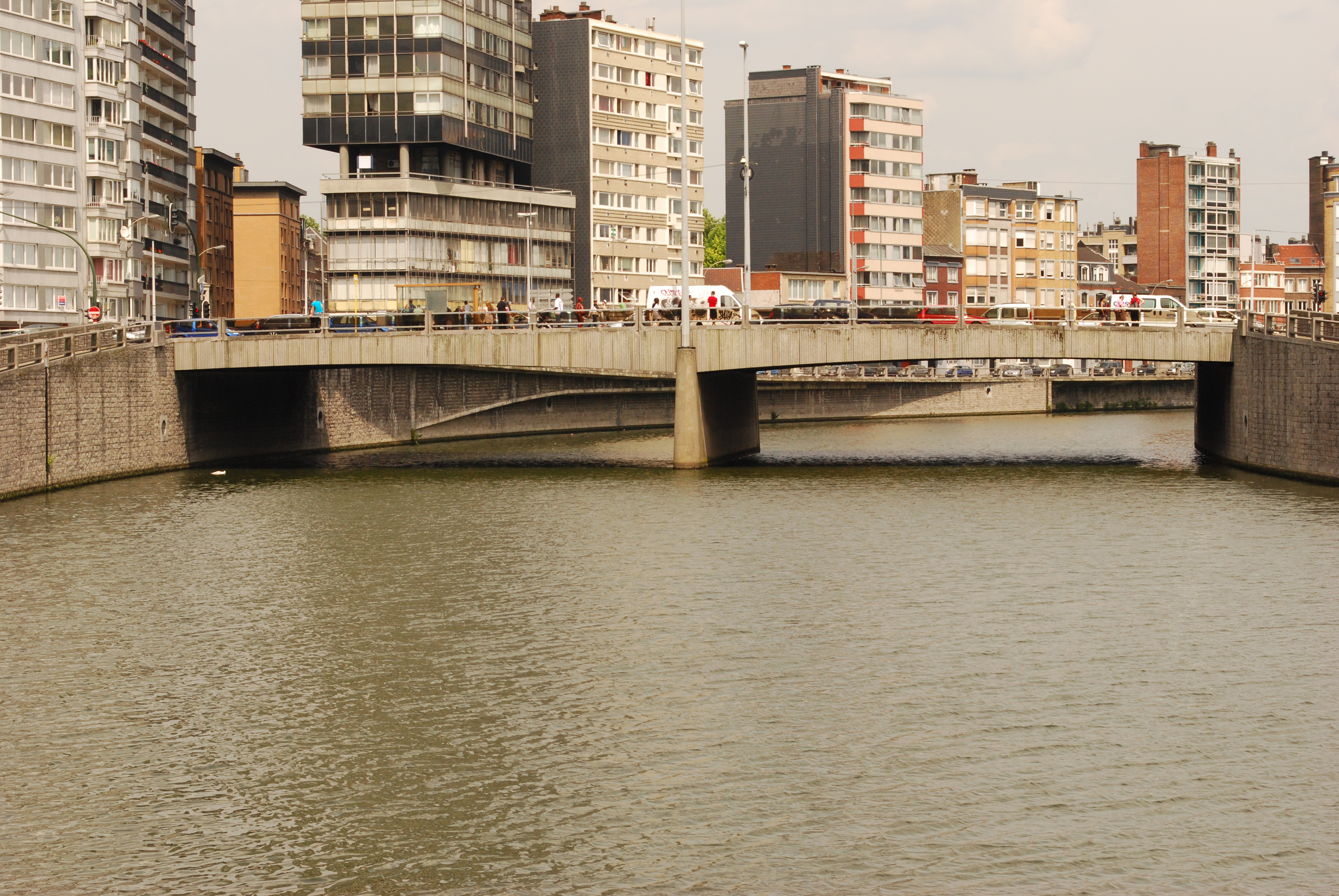 Le pont de Longdoz sur la Dérivation de la Meuse à Liège.